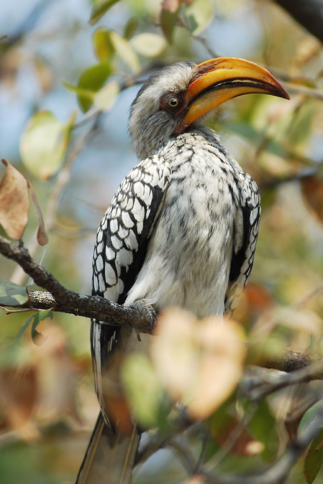 Tockus leucomelas Botswana, Moremi, Okavango